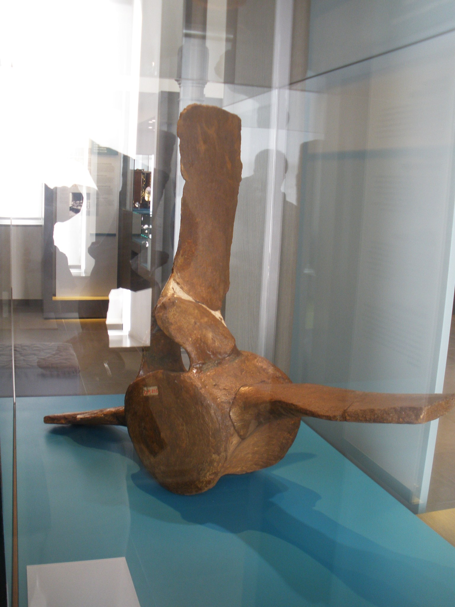 Fossil of Balaena primigenia, an extinct whale Took the photo at Musee d'Histoire Naturelle, Brussels